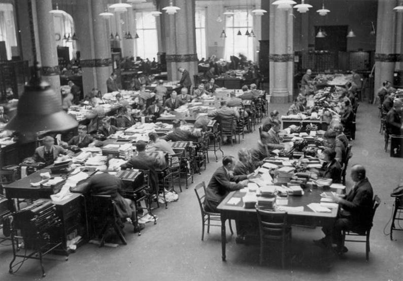 Deutsche Bank und Disconto-Gesellschaft Berlin (Zentrale)